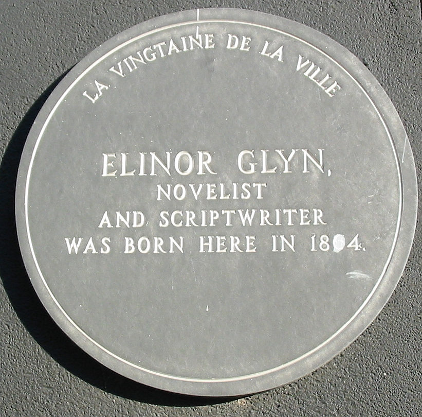 Elinor Glyn